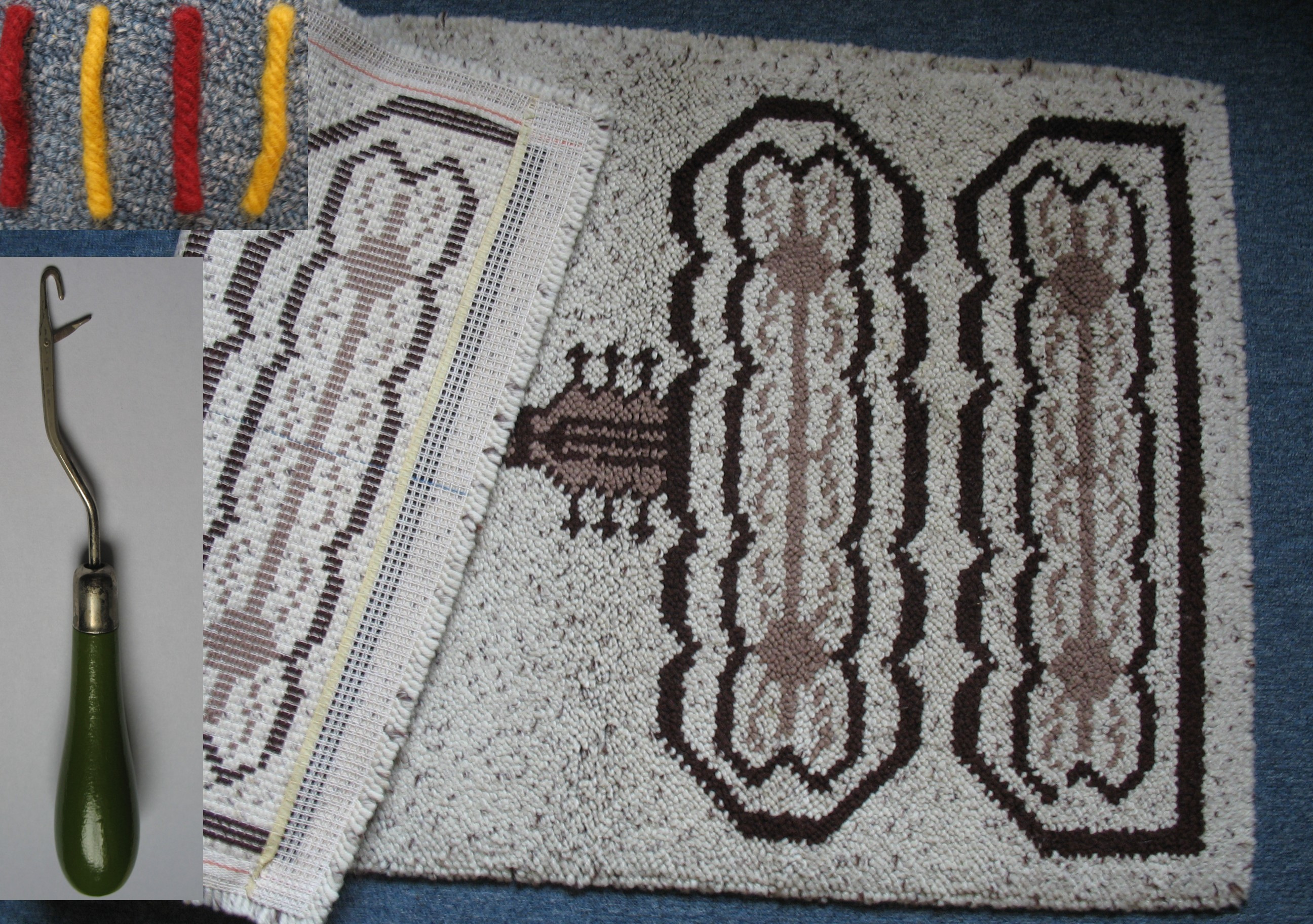 Hobbyarbeit:Knüpfteppich,Garnmuster und Nadel